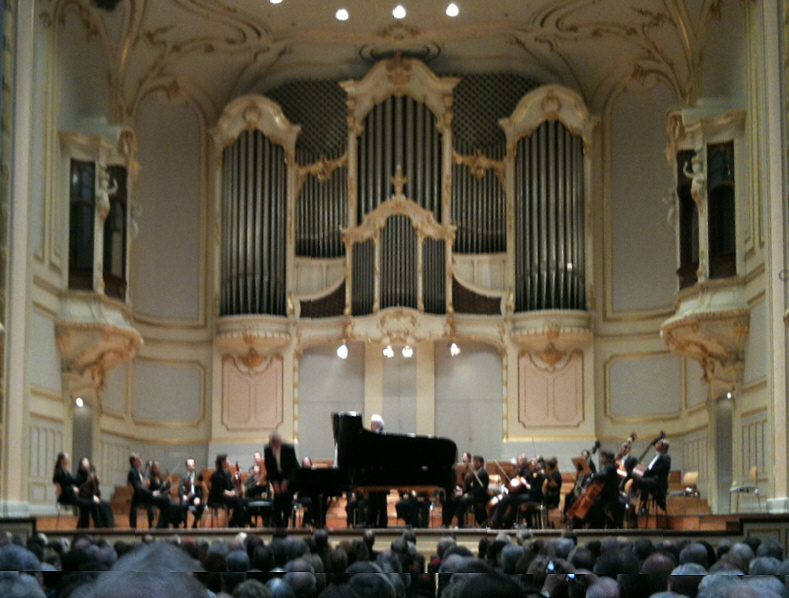 Laeiszhalle, Hamburg